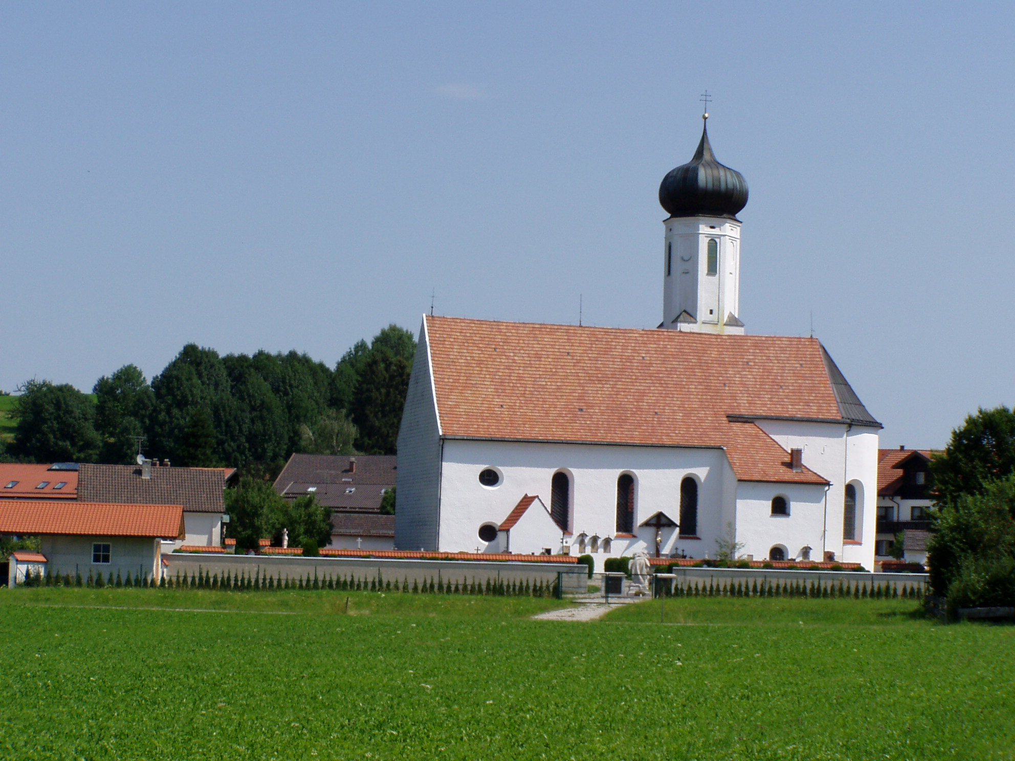 Kirche in Bayerniederhofen, Halblech